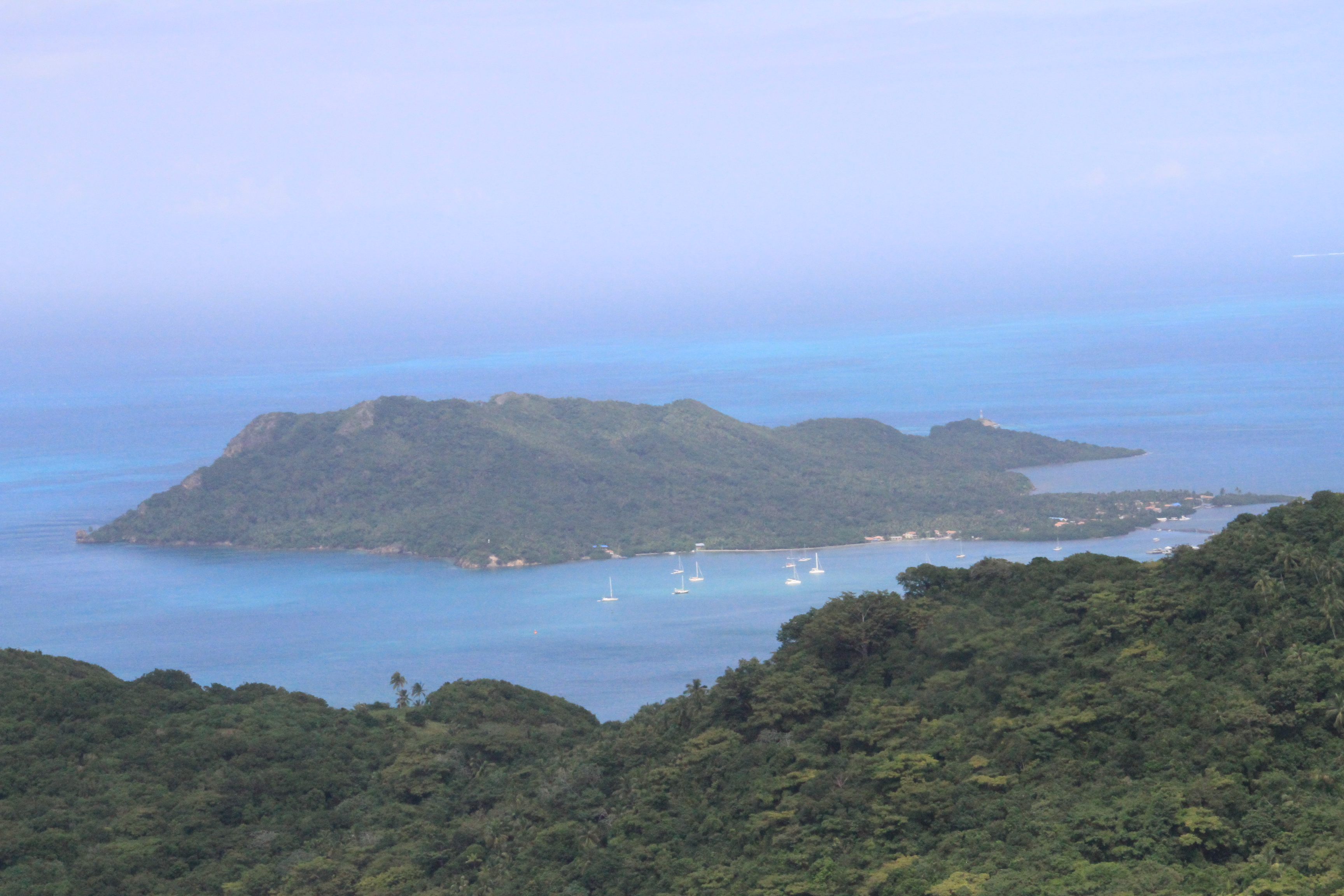 Providencia - Colombia